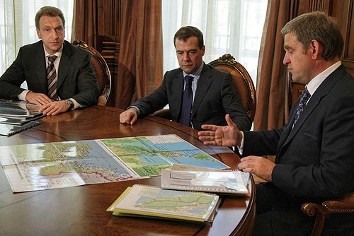 Дмитрий Медведев, Игорь Шувалов, Сергей Дарькин